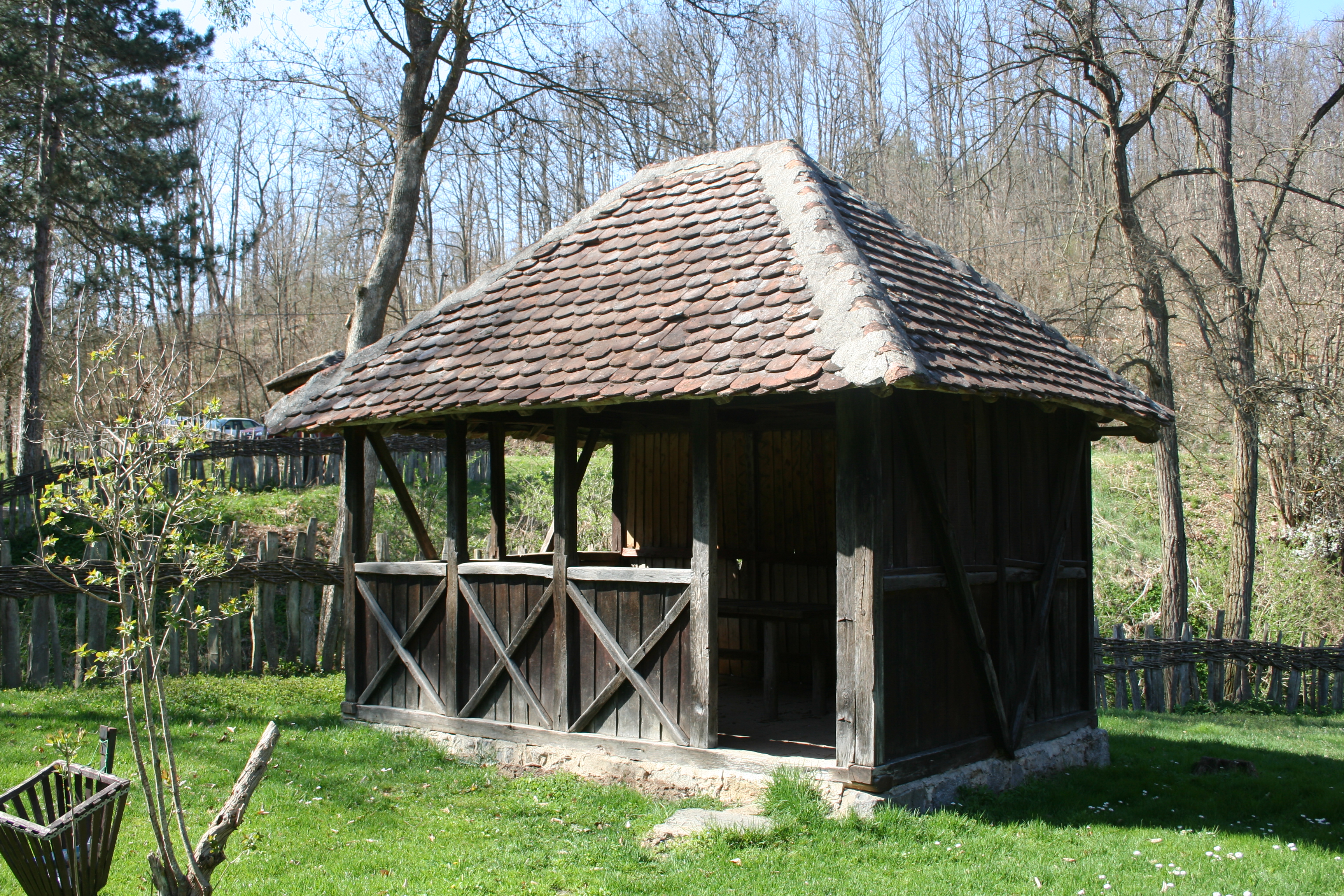 Sobrašica u porti crkve, Brankovina